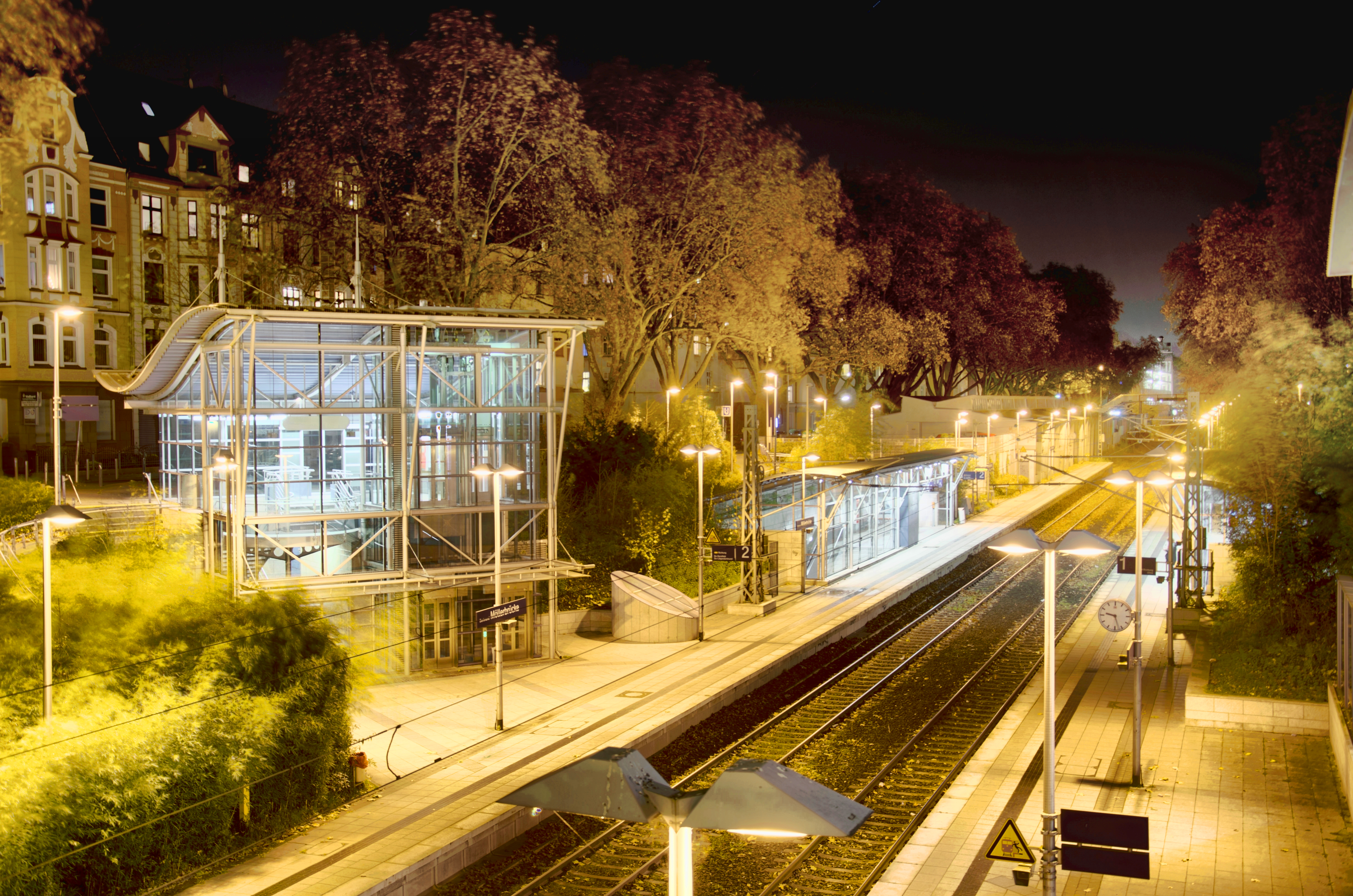 S-Bahn Haltestelle "Möllerbrücke" (Dortmund, Germany) - High Dynamic Range Image